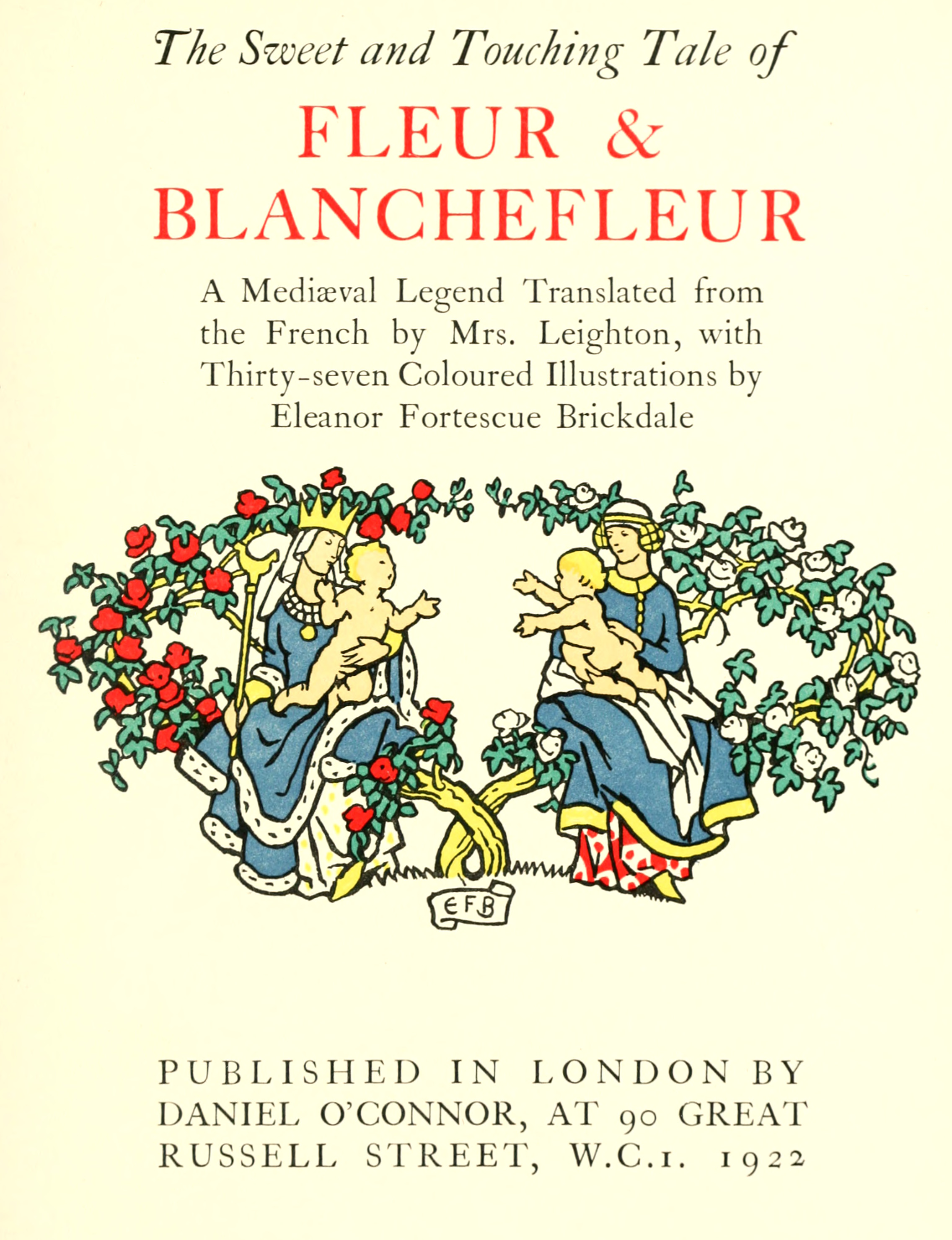 Le conte de Fleur et Blanchefleur, illustré par Eleanor Fortescue-Brickdale, 1922 ː couverture.